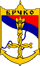 Грб општине Брчко